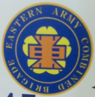 東部方面混成団ロゴマーク